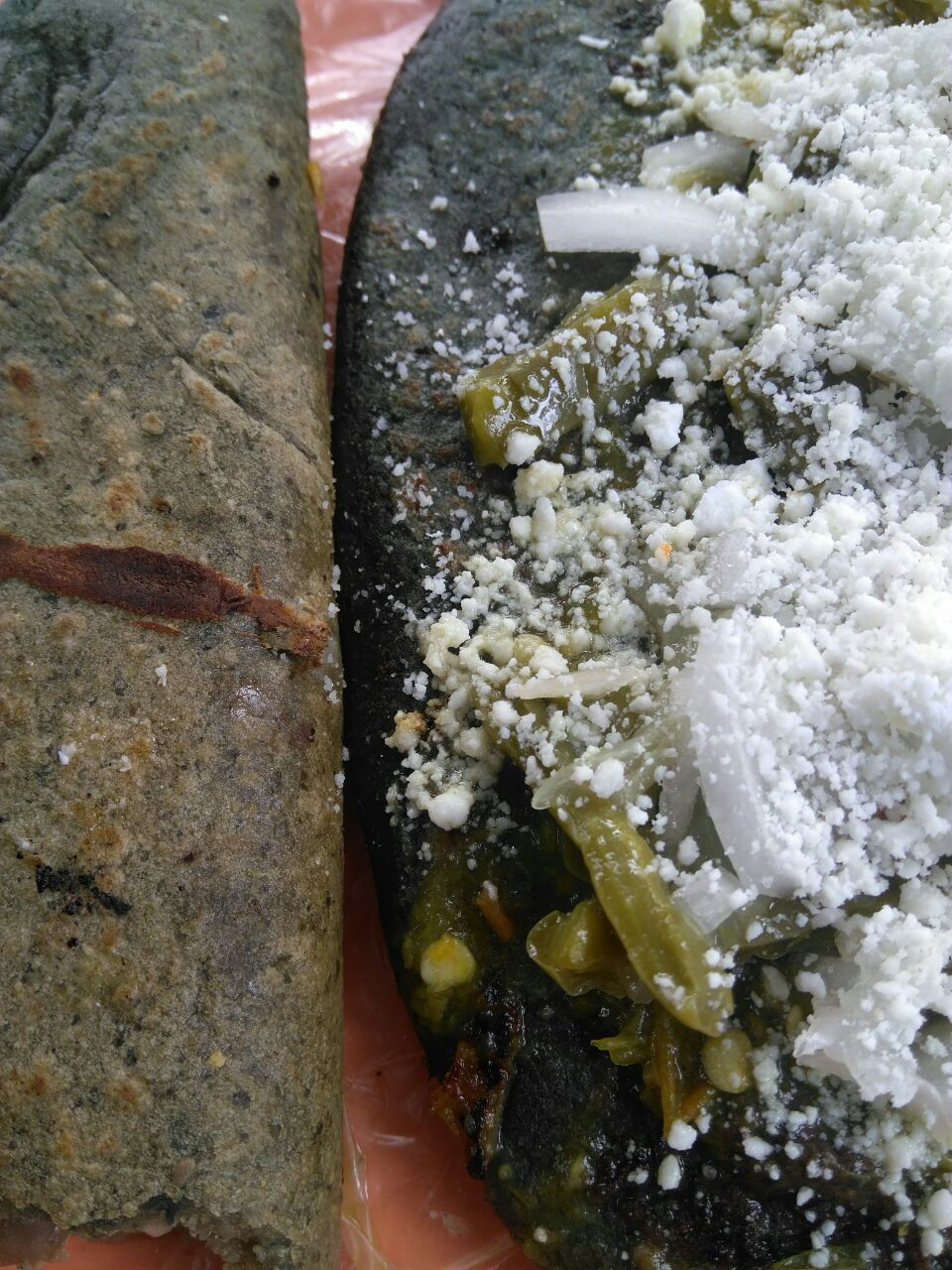 Tlacoyo y quesadilla con tortilla de maíz azul